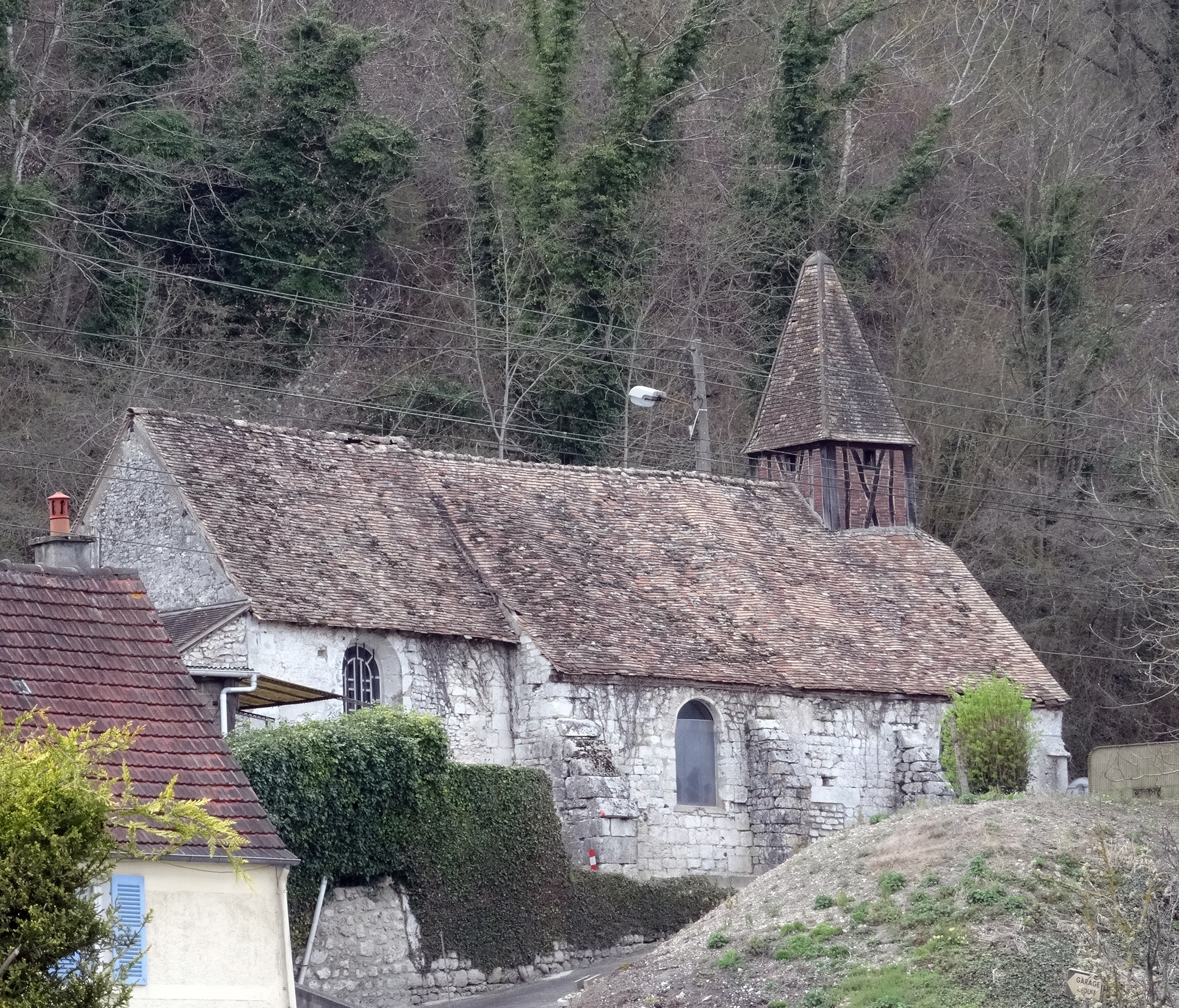 Église Saint-Pierre de Port-Villez. (Yvelines, région Île-de-France).